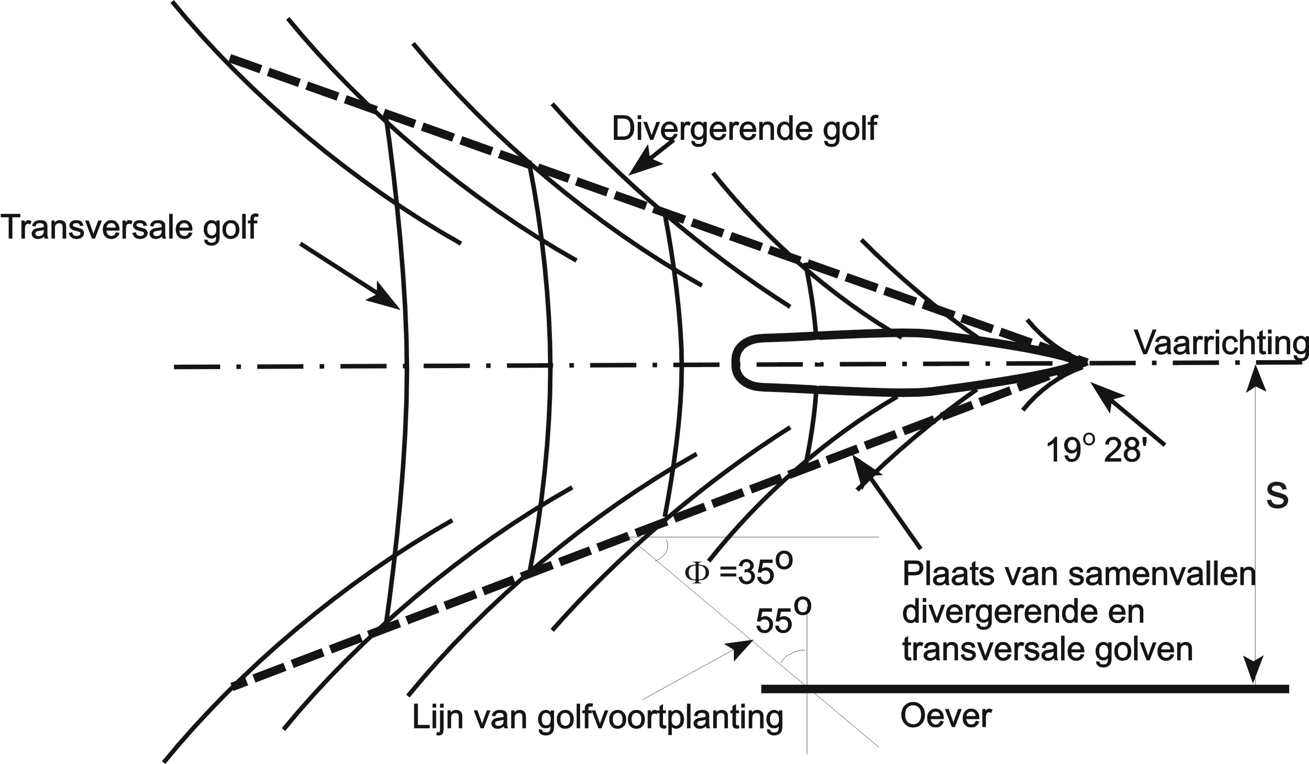 Overzicht van de secundaire scheepsgolven